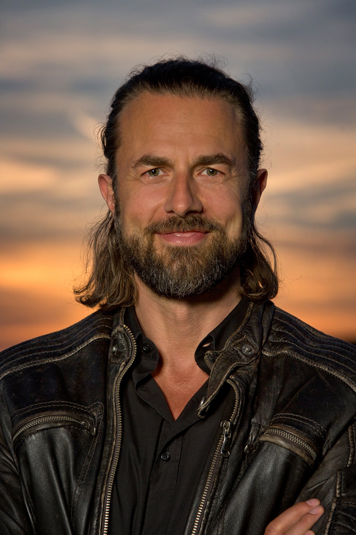 Foto Veit Lindau